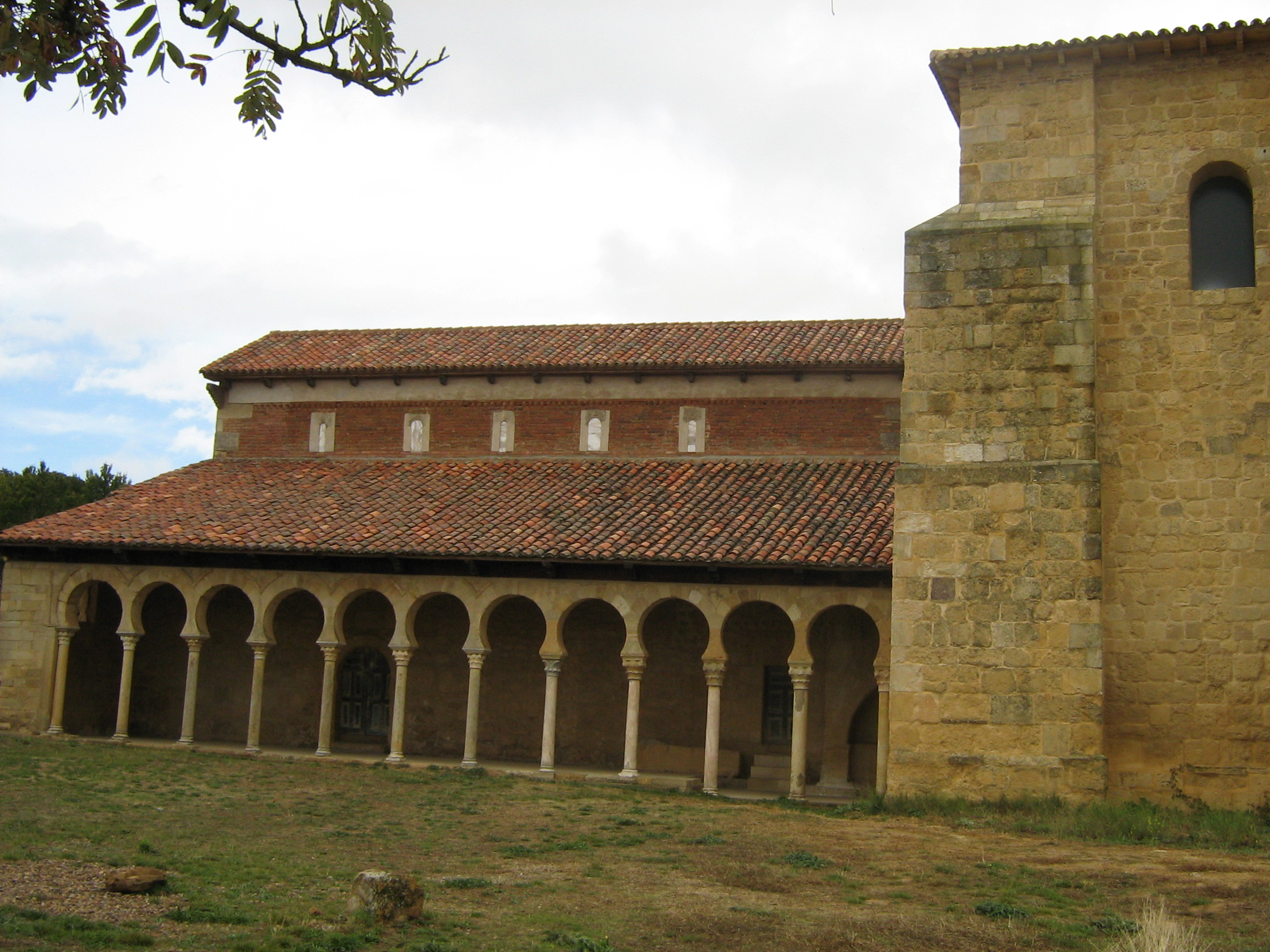 San Miguel de Escalada: vista parcial.